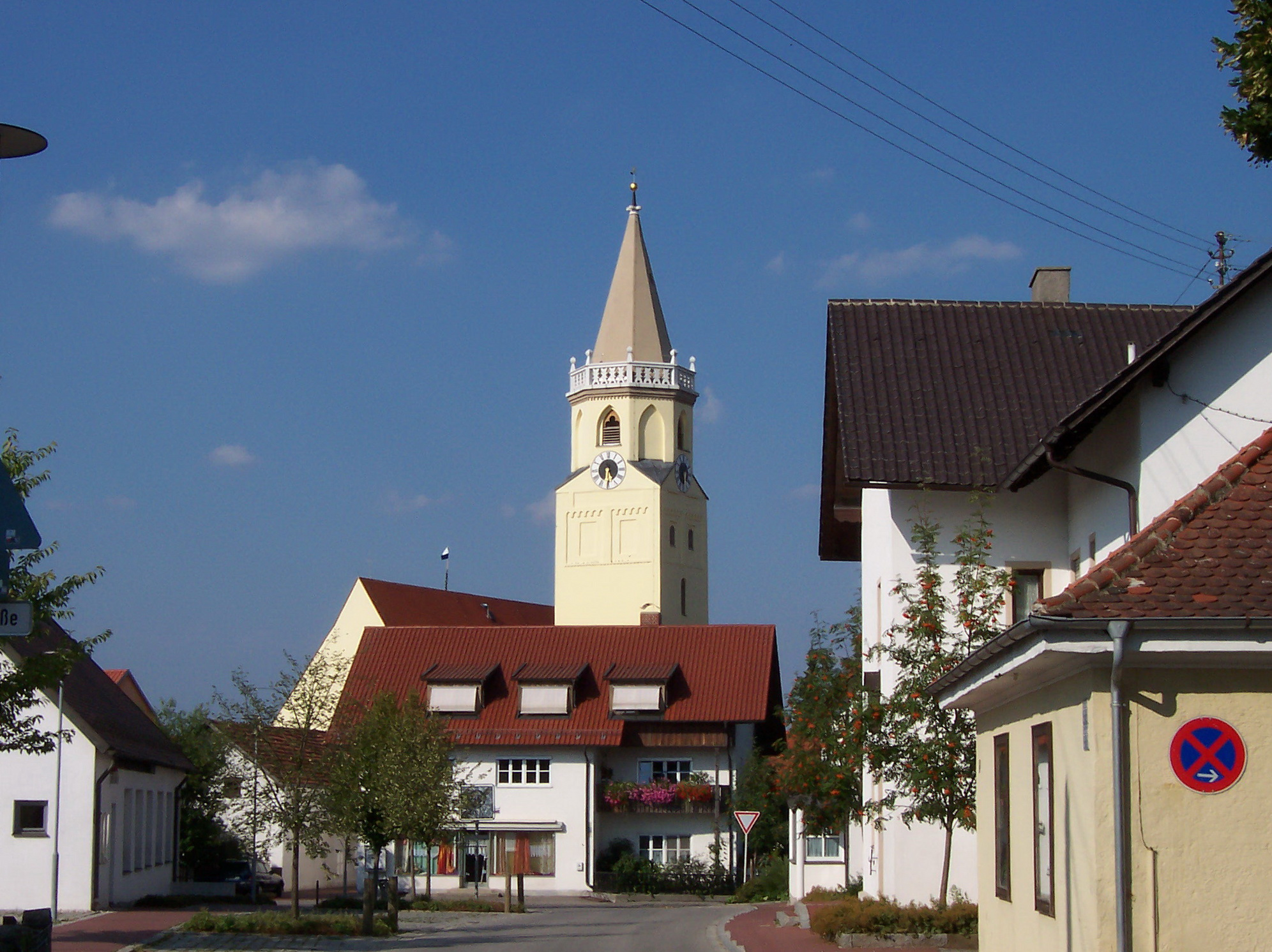 Essenbach. Kath. Kirche Maria Himmelfahrt. spätgotischer Bau um 1470, durch Seitenschiffe um 1670 und nochmals 1713 erweitert; mit Ausstattung.